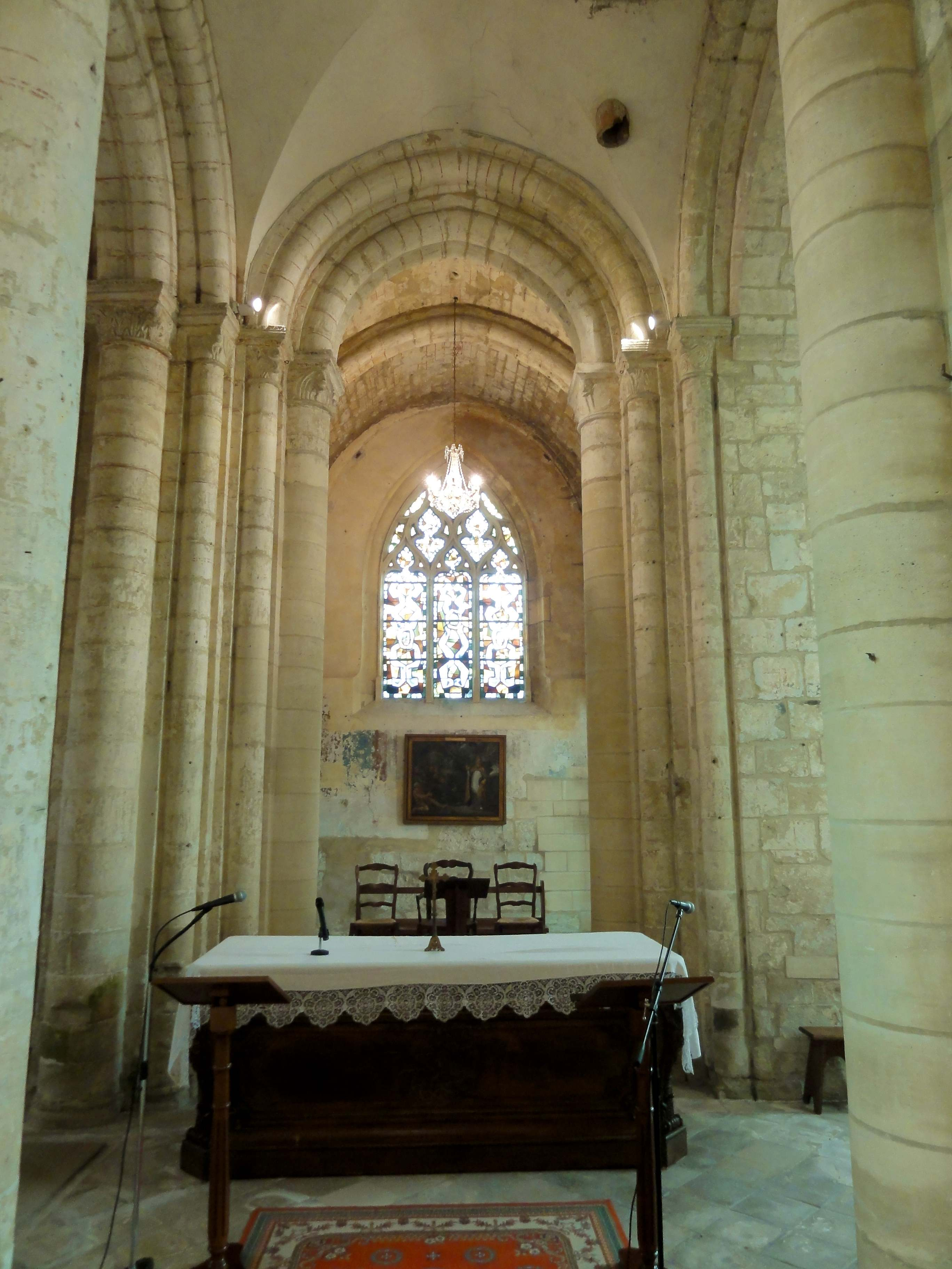 Intérieur de l'église (voir titre).